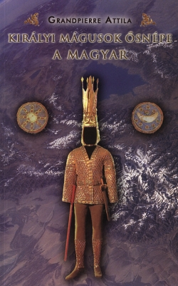 Grandpierre Attila: Királyi mágusok ősnépe a magyar című könyvének borítója.